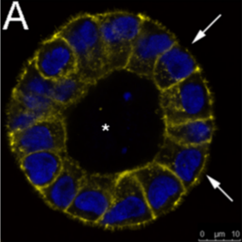 Figura 5. Hugl regula la polaridad apicobasal y la formación de luz en acinos mamarios. Las células se incubaron con anticuerpos primarios marcando los dominios citoesqueléticos (anti-faloidina, amarillo). Núcleos teñidos con DAPI (en azul). Se tomaron imágenes de Acinos con un microscopio confocal. Barra de escala= 10 micras.